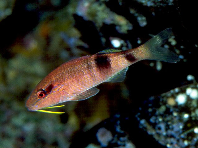 オジサン Parupeneus multifasciatus